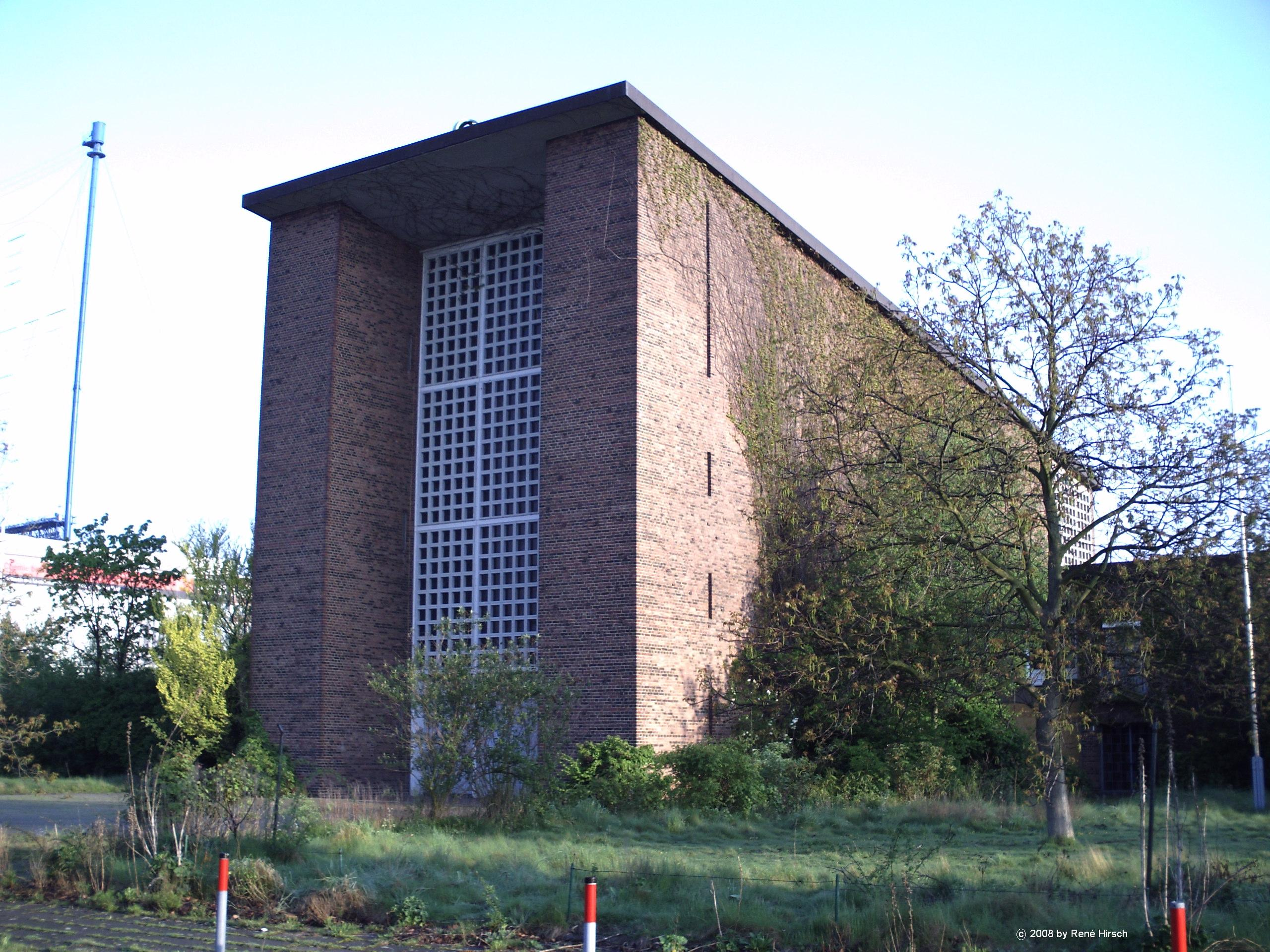 ehem.kath.Pfarrkirche St.Maria-Friedenskönigin in Leverkusen-Wiesdorf